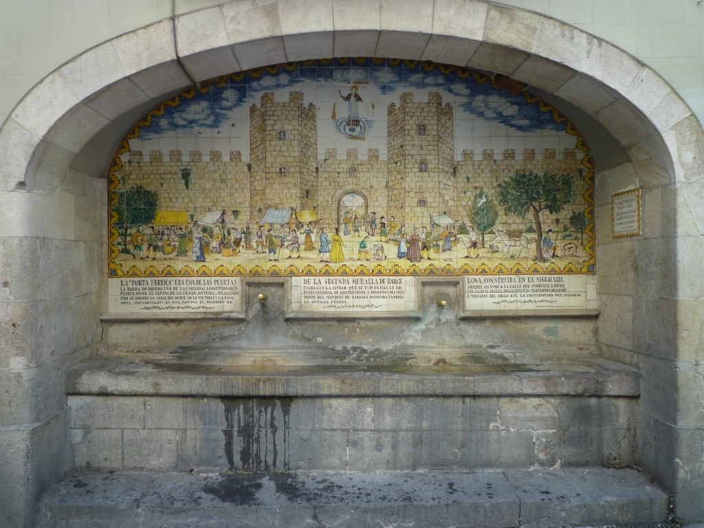 024 Barcelona